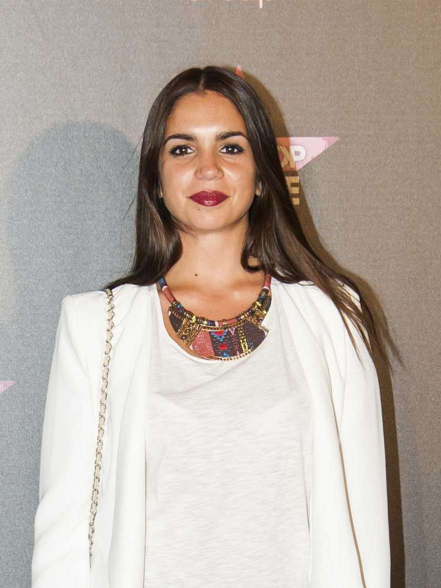 Fotos del photocall y fiesta de lanzamiento de un nuevo canal de televisión en España.